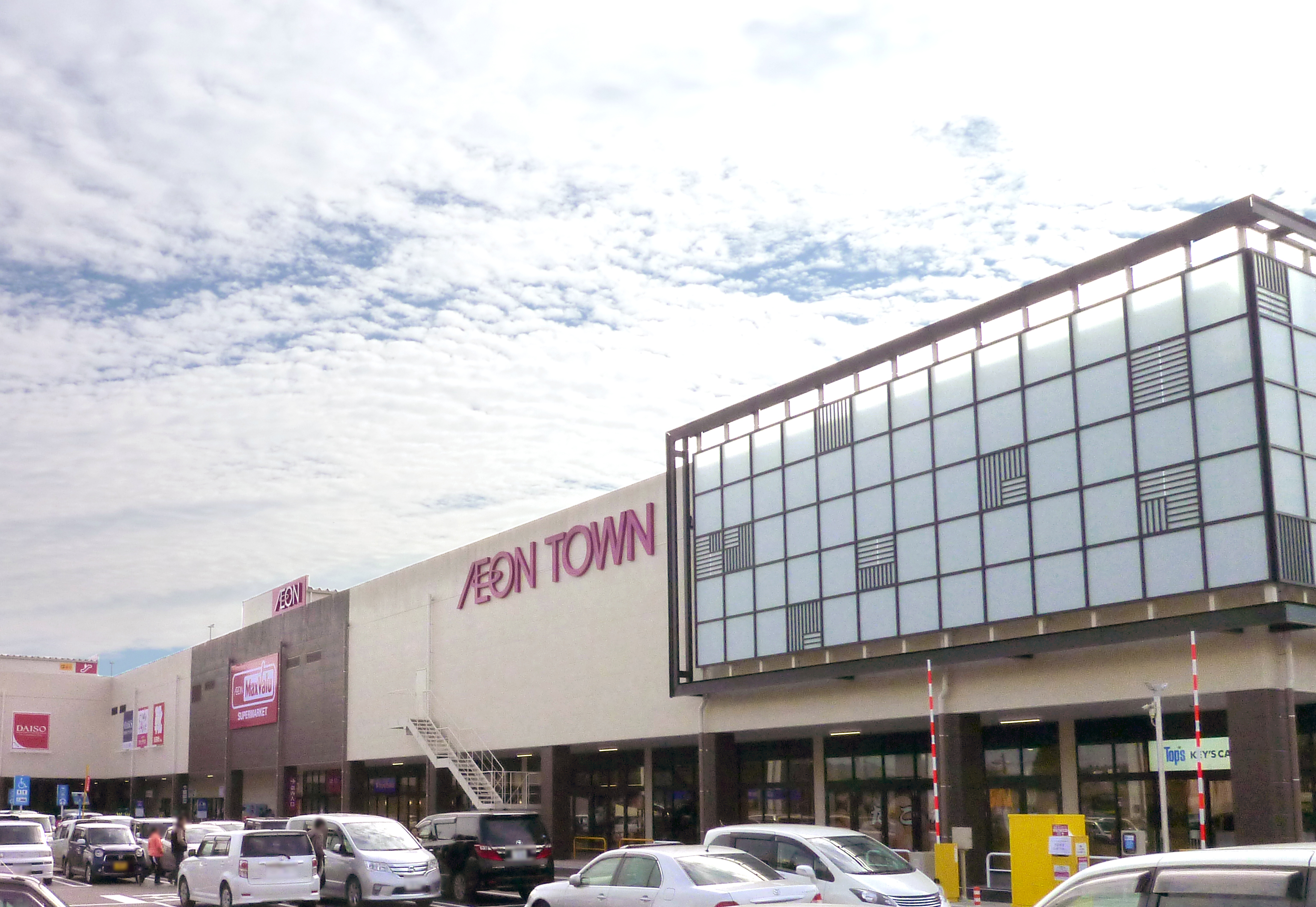 イオンタウン成田富里、正面出入り口付近